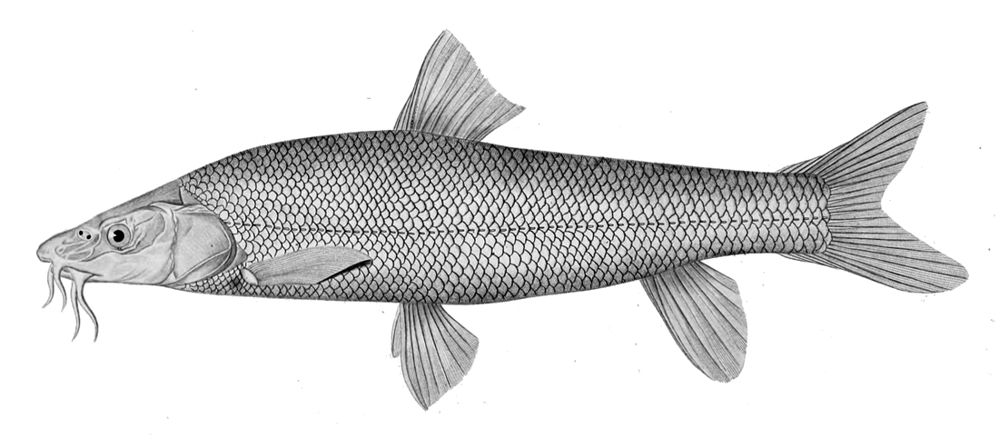 Barbus capito conocephalus